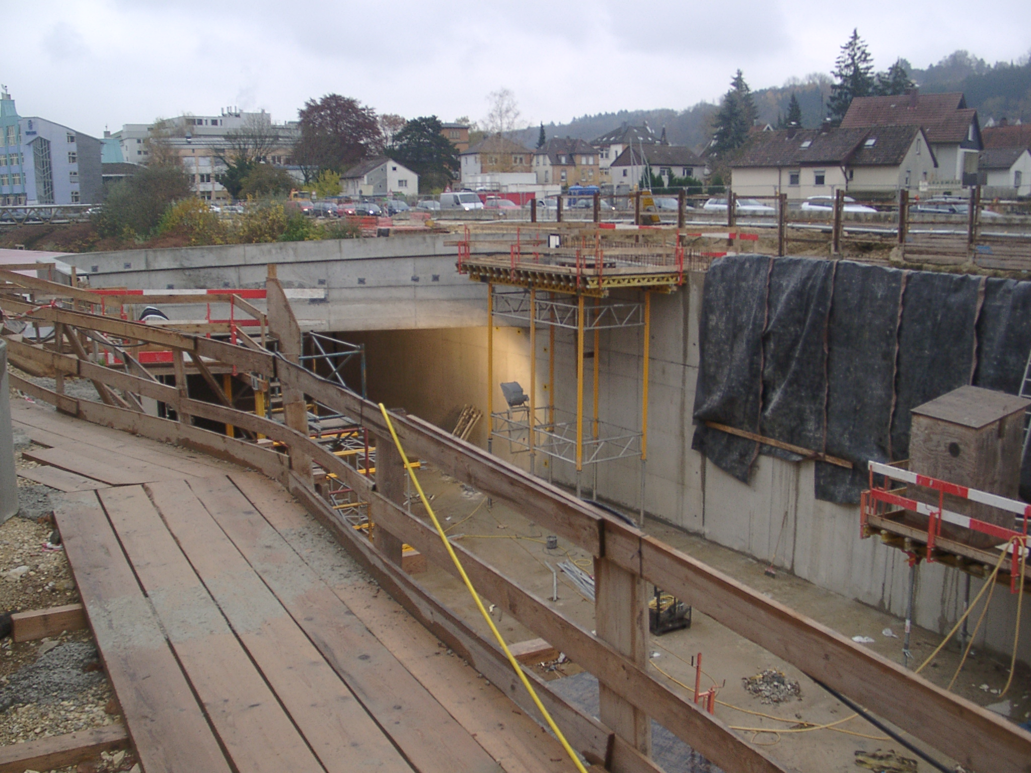 Tunnelbau bei der Leonhardskapelle